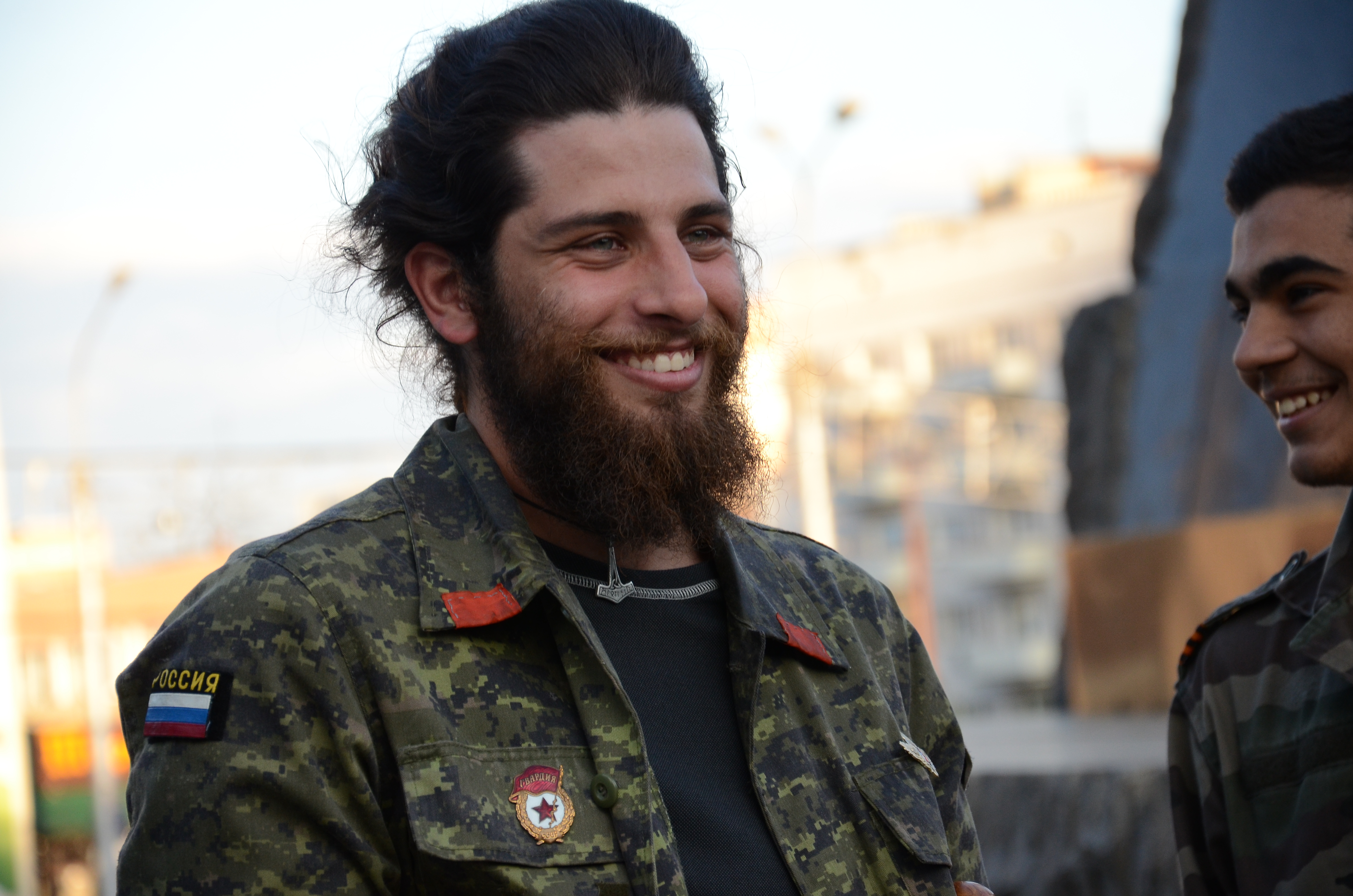 Репетиция парада в честь дня Победы в Донецке